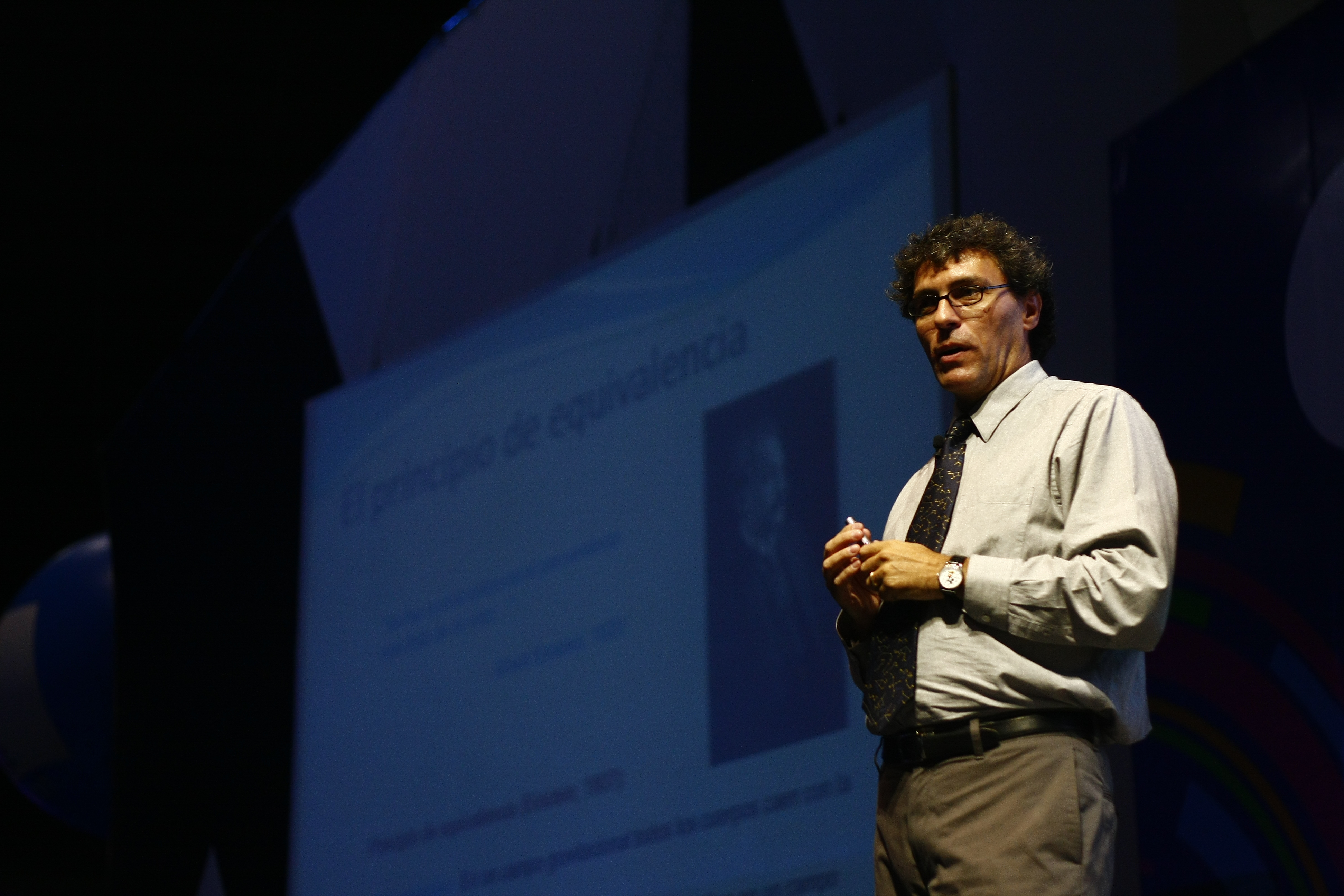 Uno de los físicos más destacados de México a nivel internacional, Miguel Alcubierre investiga en las áreas de relatividad numérica y agujeros negros. Es creador de la “Métrica de Alcubierre”, un modelo matemático que plantea la posibilidad de viajar más rápido que la luz a partir de la deformación del tiempo-espacio, una idea que en el campo de la física revoluciona y complementa la teoría de la relatividad de Albert Einstein. Con un doctorado de la Universidad de Gales en Cardiff, Reino Unido, ingresó como investigador adjunto al Instituto Max Plack para Física Gravitacional, en Potsdam, Alemania. Posteriormente ingresó al Instituto de Ciencias Nucleares de la UNAM donde actualmente es investigador Titular “C” de tiempo completo. foto: alviseni